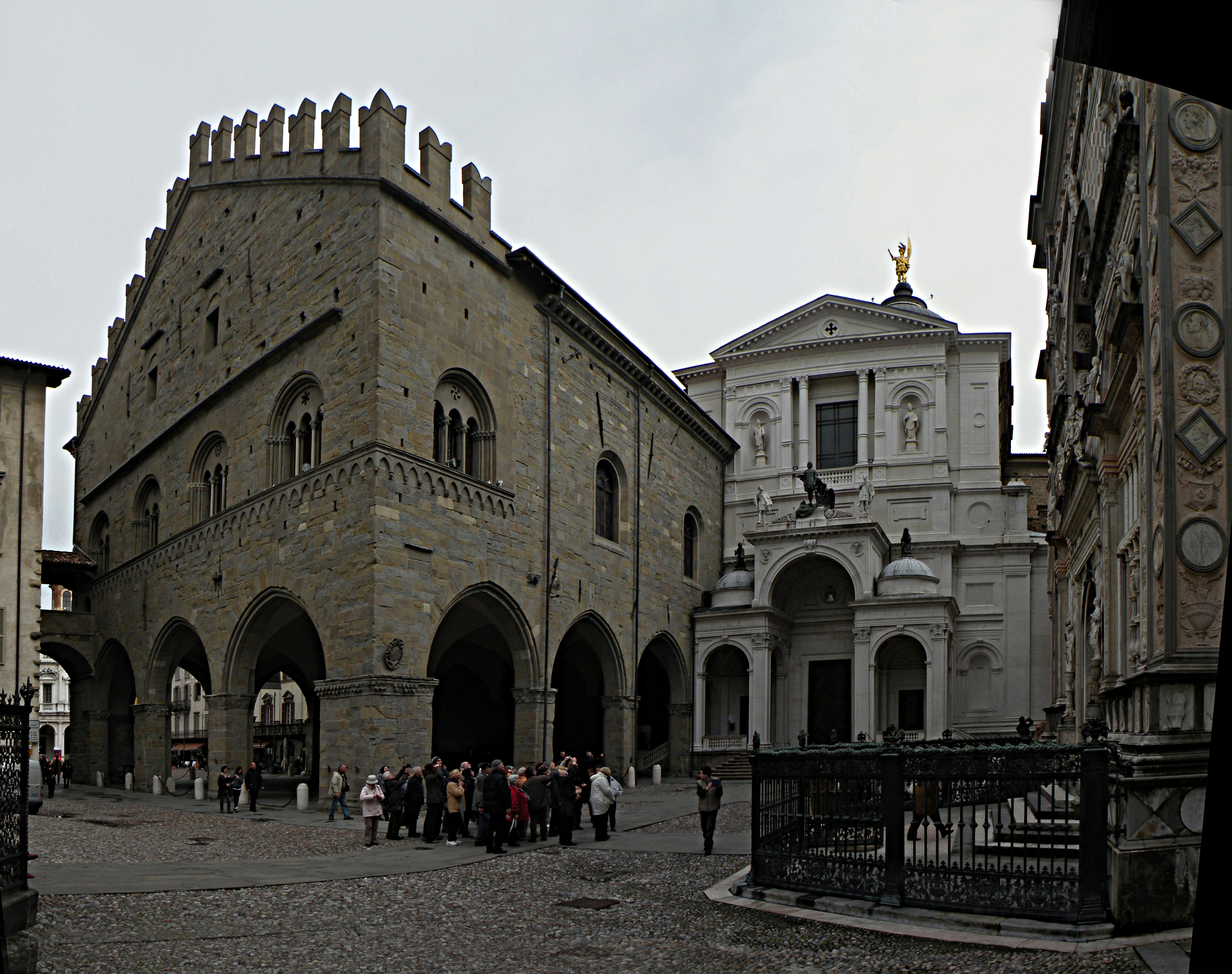 Портал собора в Бергамо